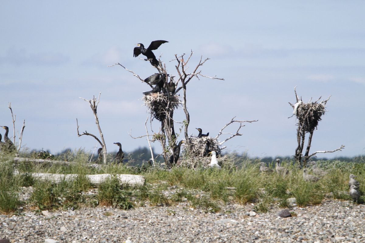 Rødskjær har høy tetthet av hekkende storskarv.